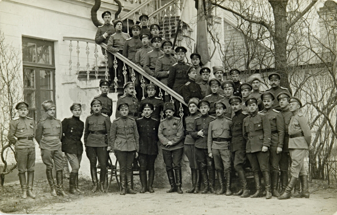 1. Eesti polgu ohvitserid Haapsalus, keskel polguülem kindralmajor Ernst Põdder.